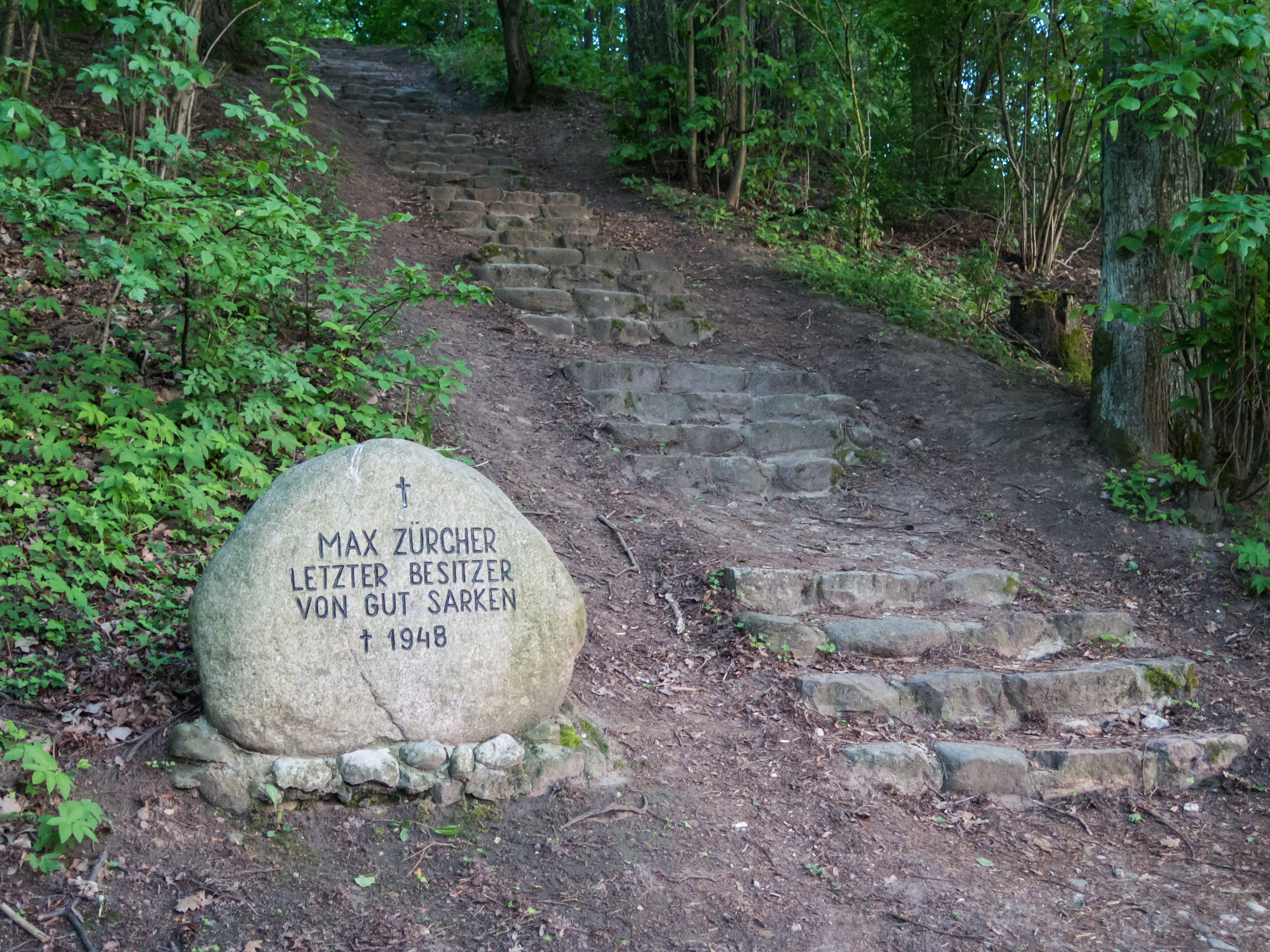 Pamiątkowy kamień i schody na Górę Bunelka w miejscowości Szarek koło Ełku. Na szczycie góry znajduje się niemiecko-rosyjski cmentarz wojenny z I wojny światowej.